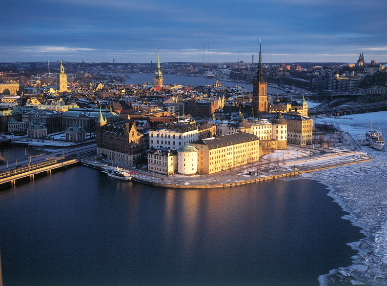 Botan